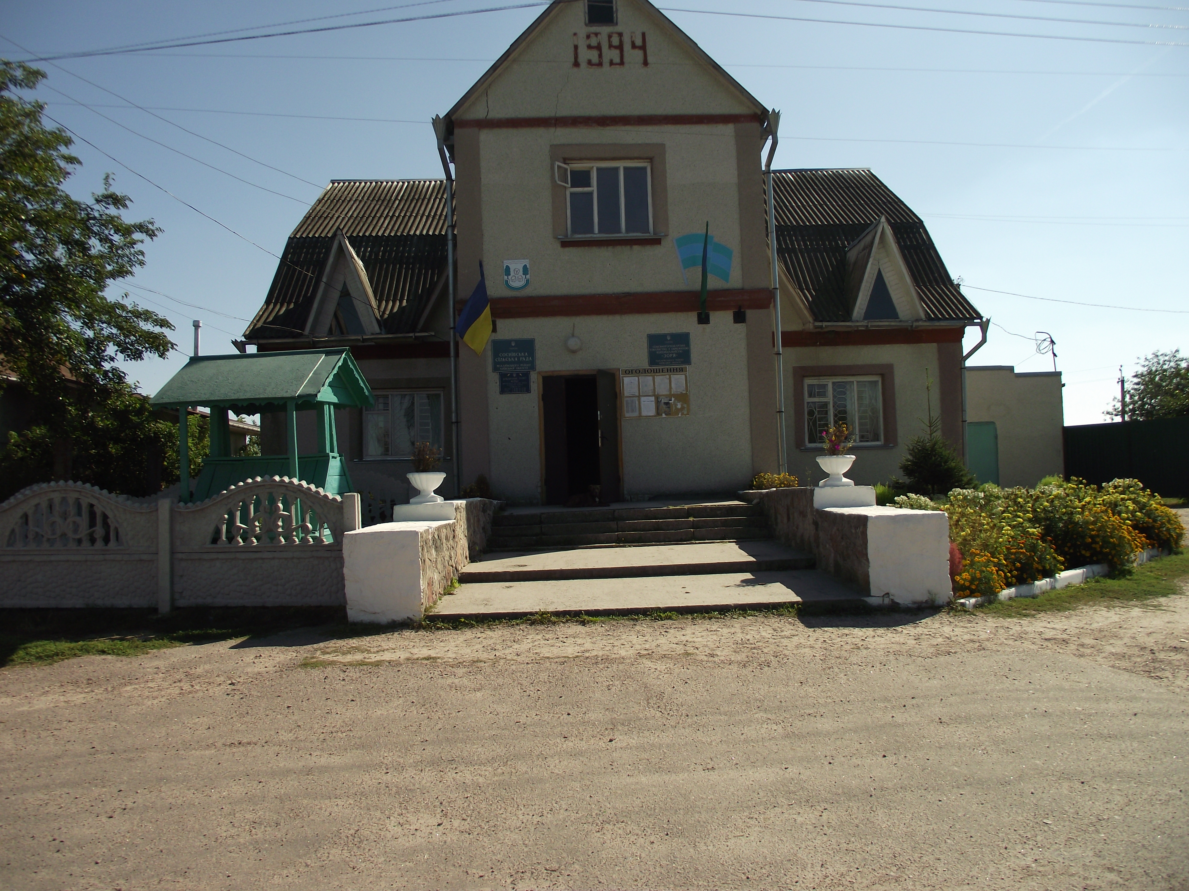 Соснівка, сільська рада.